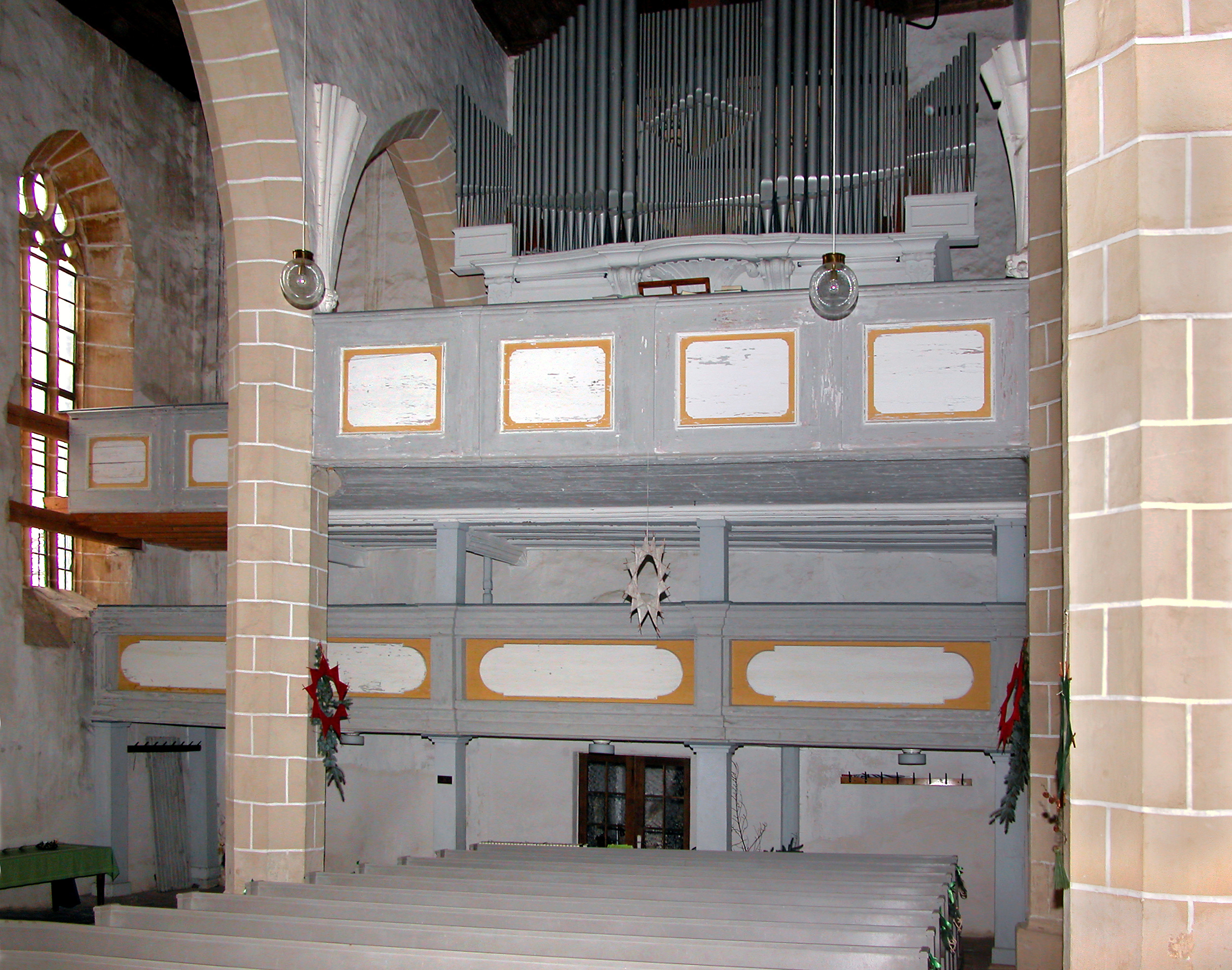 05.12.2009 01665 Burkhardswalde (Klipphausen) Kirchweg: Ehemalige Wallfahrtskirche (GMP: 51.073714,13.430011), Dorfkirche. Dreischiffige spätgotische Hallenkirche (15. Jahrhundert), in Sanierung. Blick zur Orgel. [DSCN40320.TIF]20091205070DR.JPG(c)Blobelt